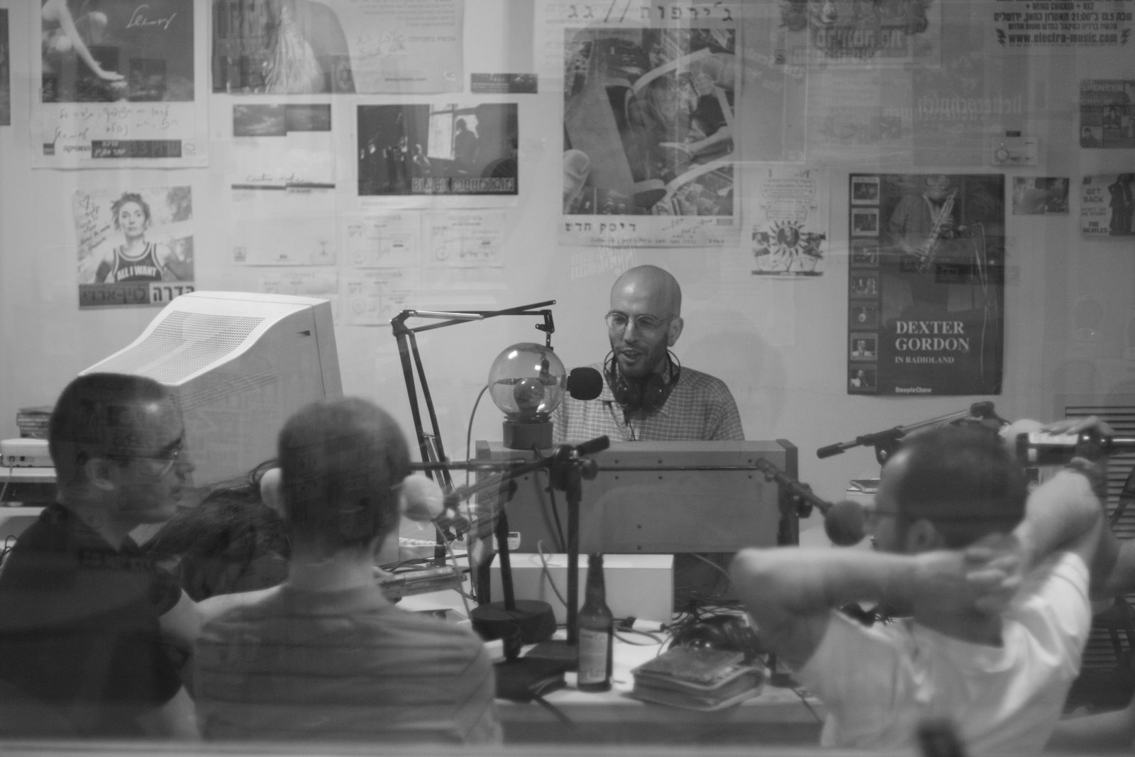 כמעט כולם בתמונה. מימין: גיא שכטר, יונתן יידוב, אורי סגל וטליה פרי, כנראה, ברגע של מנוחה על השולחן. על השידור דודו המנחם